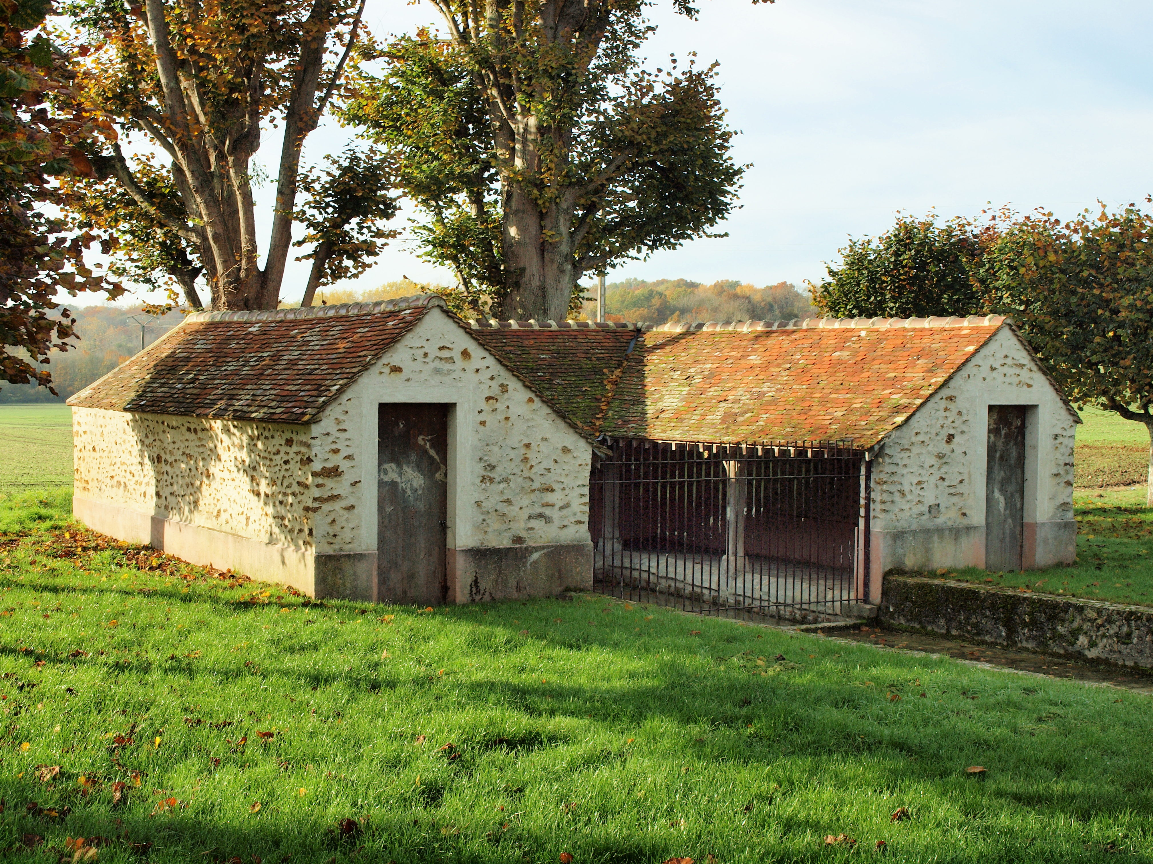 Bernay-Vilbert (Seine(er-Marne, Marne) ; bourg de Vilbert